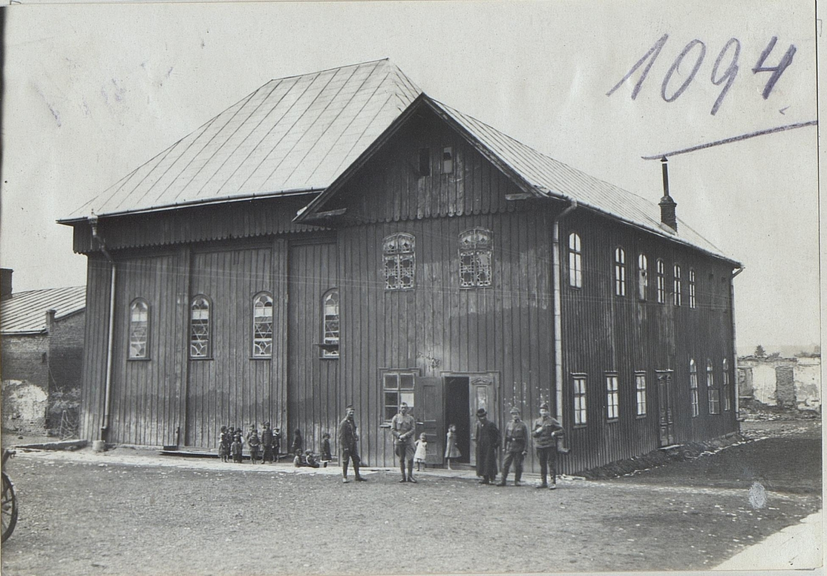 Chodorow: Altertümlicher jüdischer Tempelbau.